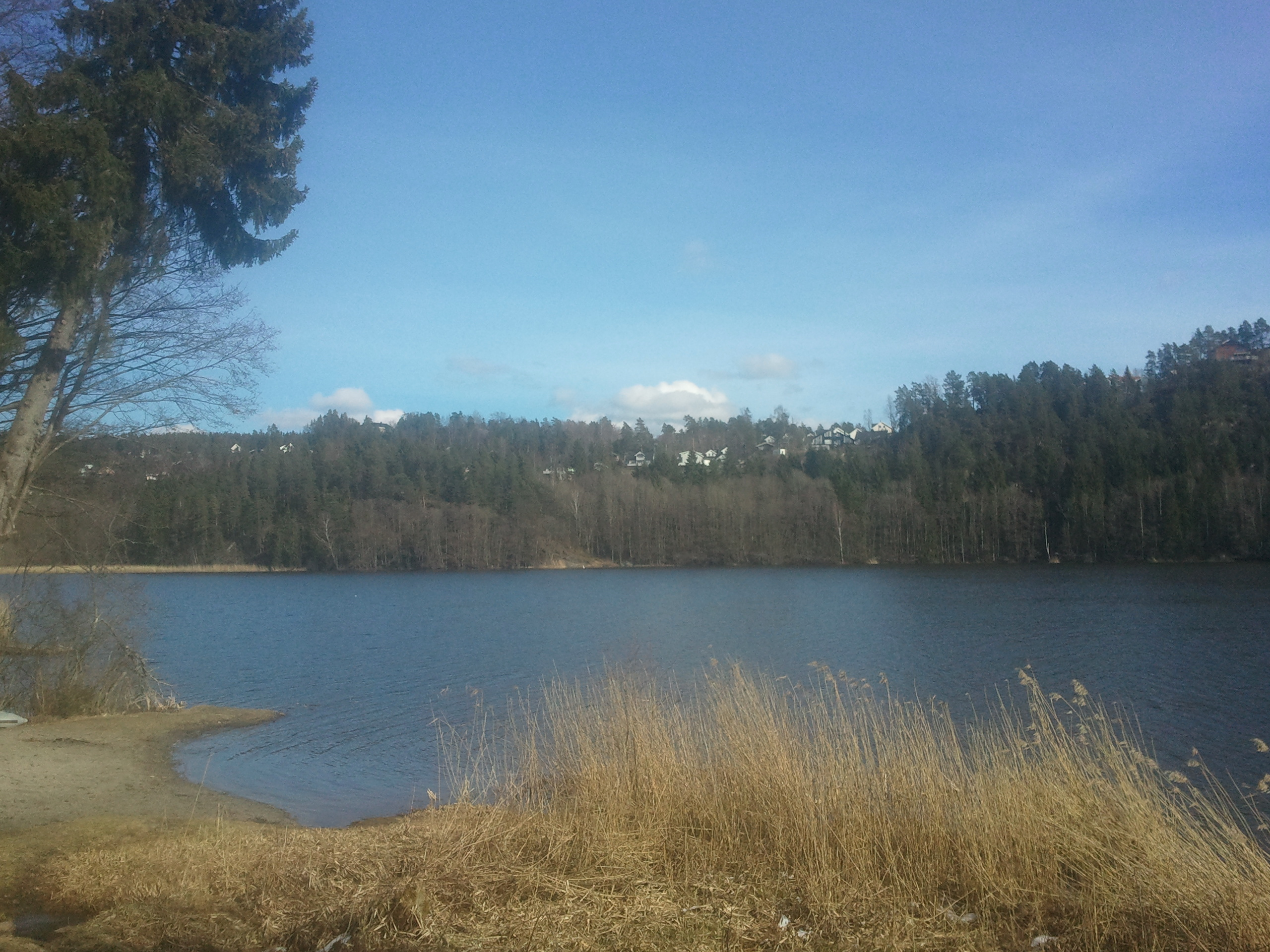 Pollevannet i Ås